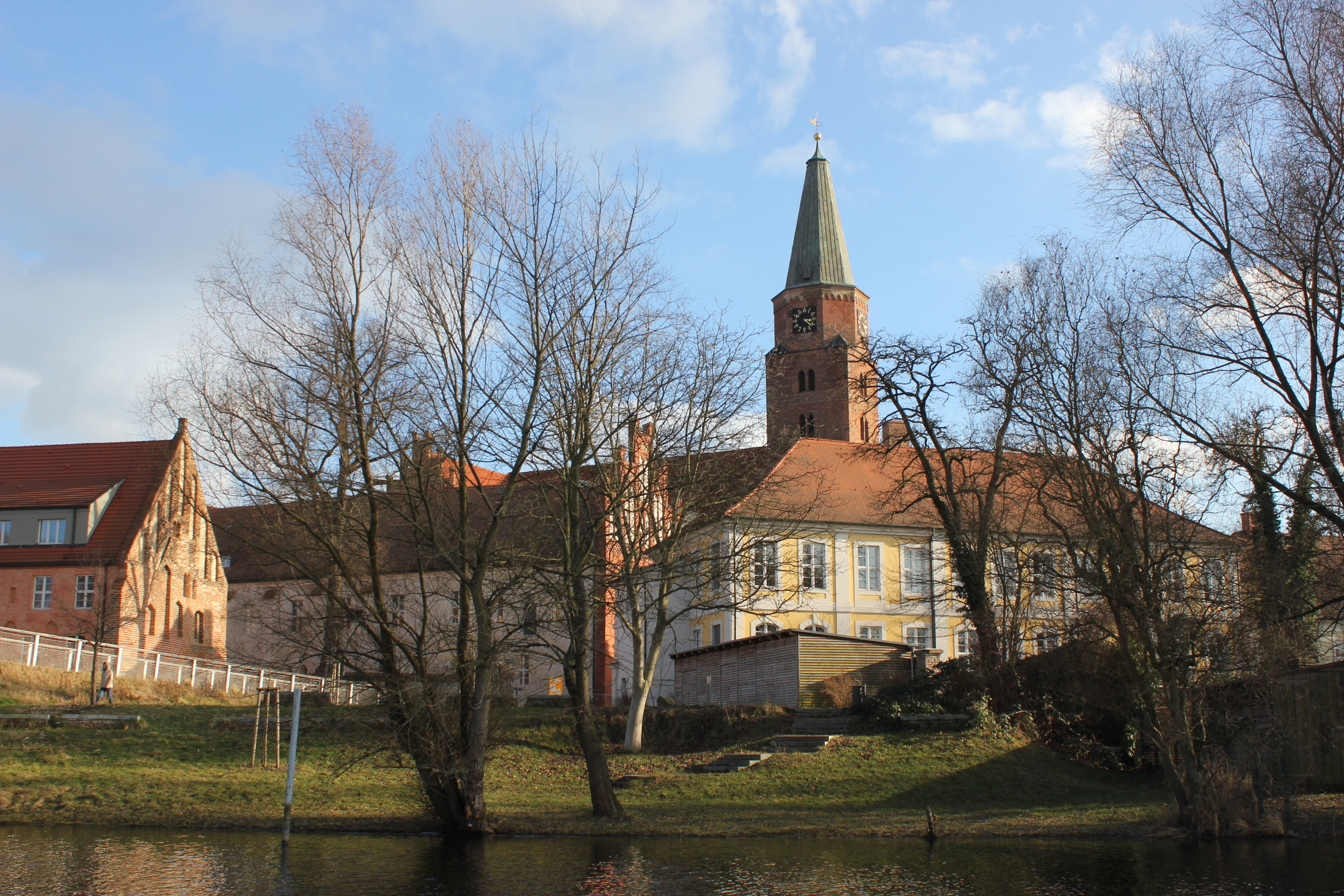 Brandenburg an der Havel, Blick auf die Dominsel.